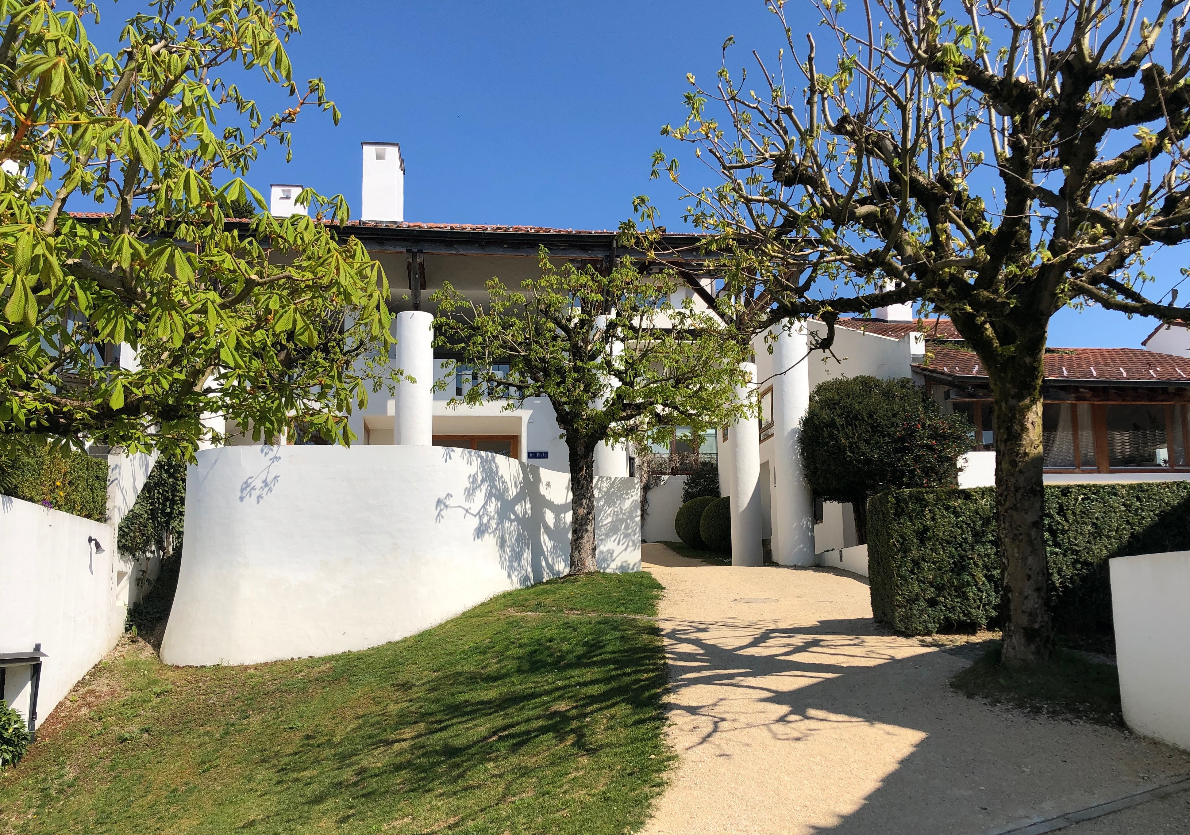 Im Dorf Seldwyla